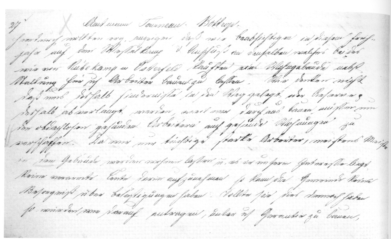 Siedlung Eisenheim Kopierbuch der JHH Bauantrag für Eisenheim 27.Februar 1846